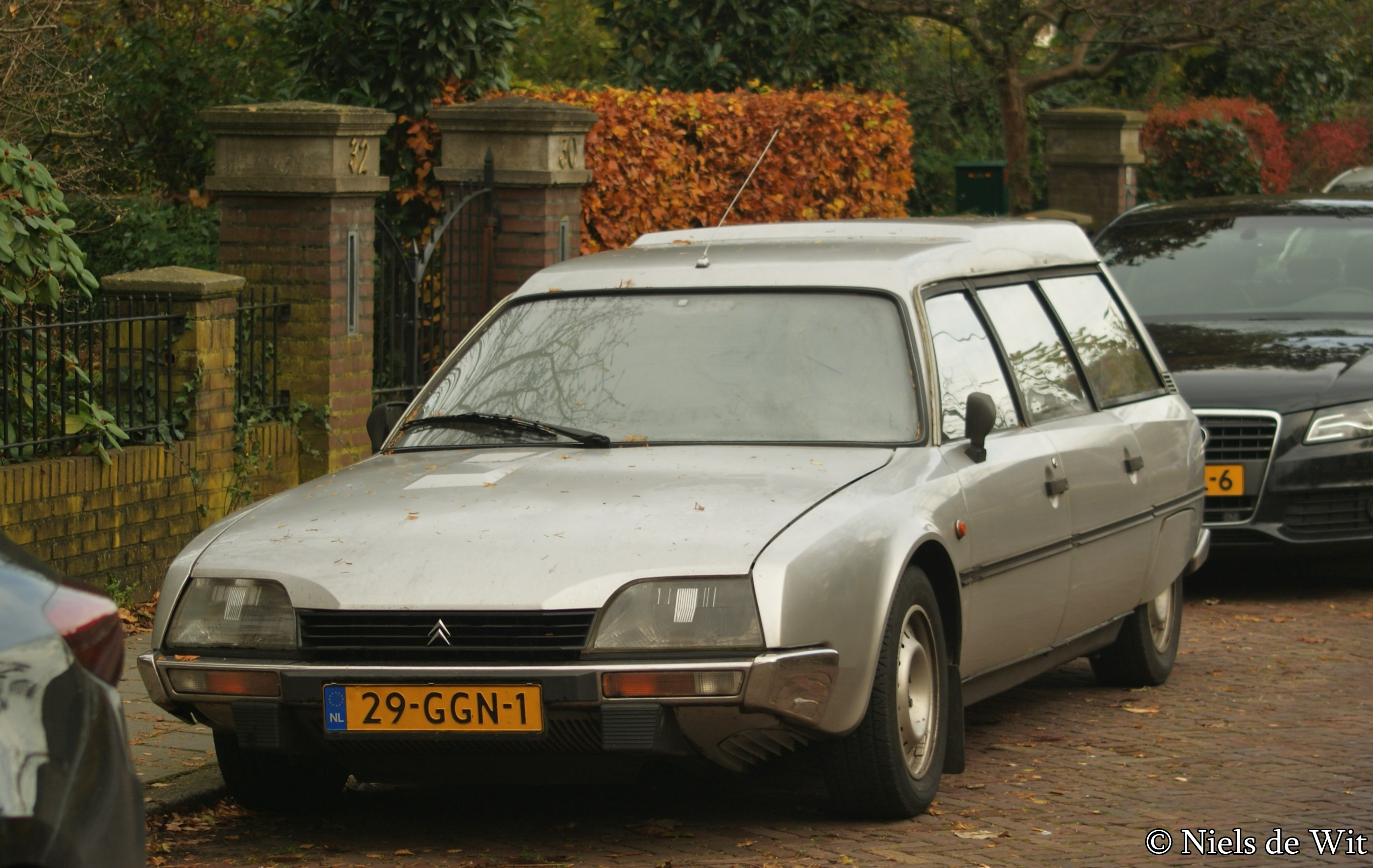 29-GGN-1